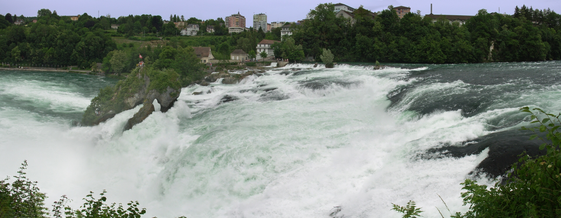 Der Rheinfall bei Schaffhausen, Überblick The Rhine Falls near Schaffhausen, Overview